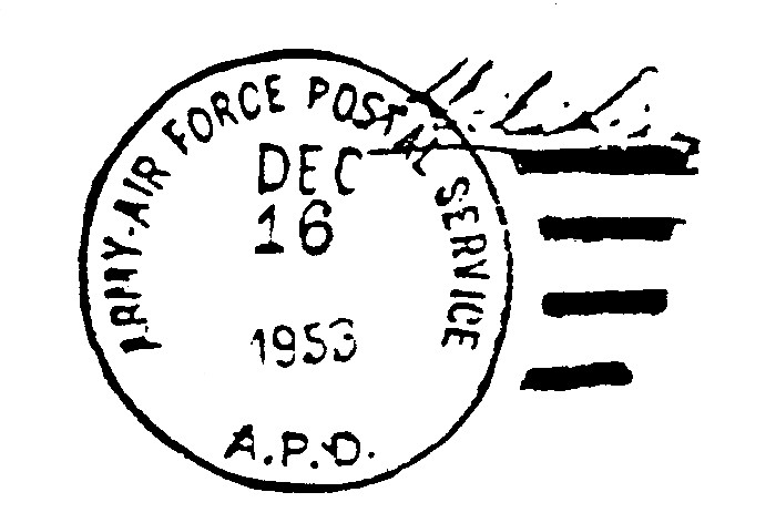 Stempel der US-Feldpost